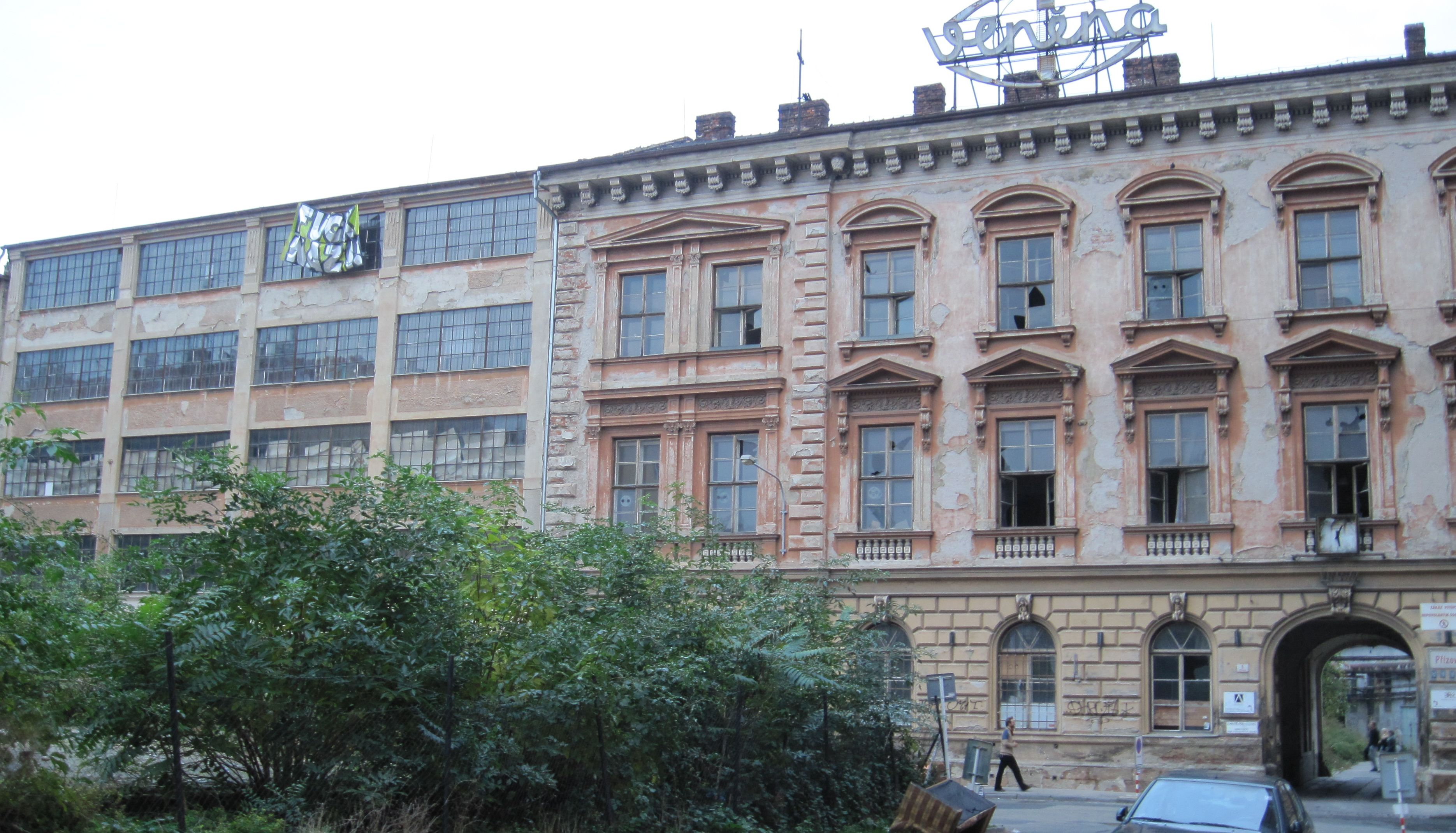 Část hlavního průčelí paláce Bochnerů ze Stražiska s připojenou funkcionalistickou přístavbou. Brno, Přízova 1.